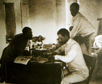 Nikolai Gumilev in Africa.